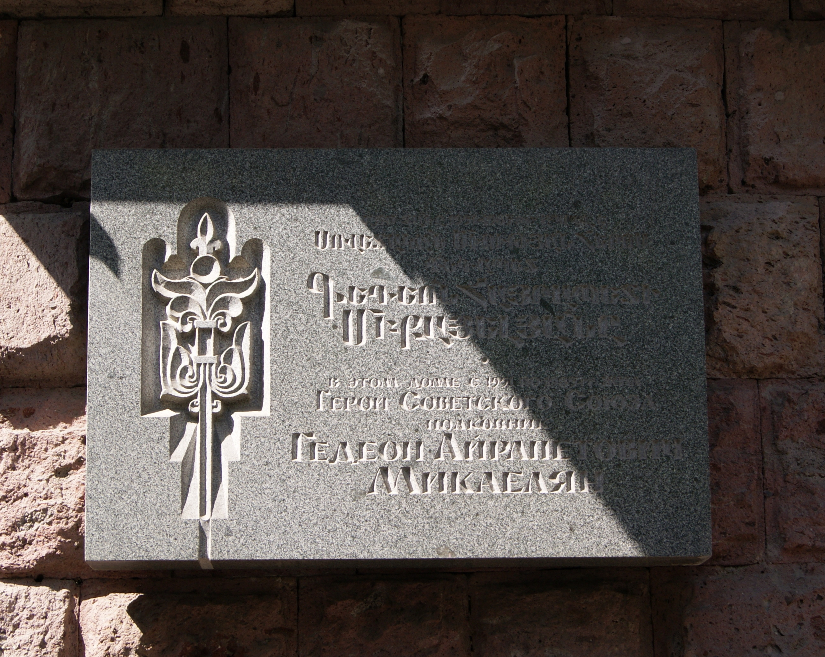 Gedeon Mikayelyan's plaque, Abovyan street 6/18